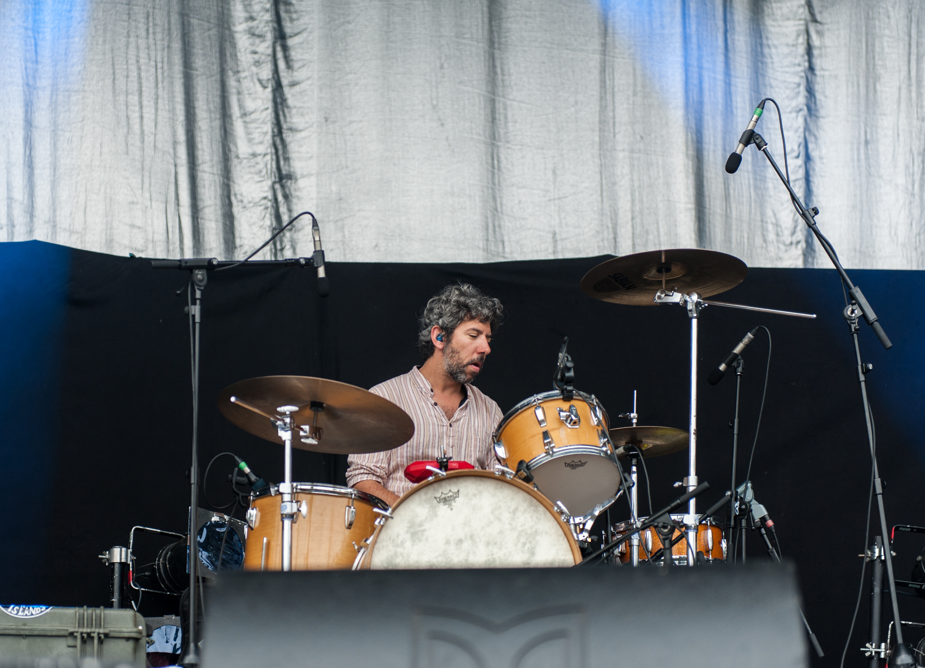 Die Band Future Islands auf dem Kosmonaut Festival 2015 in Chemnitz Oberrabenstein.